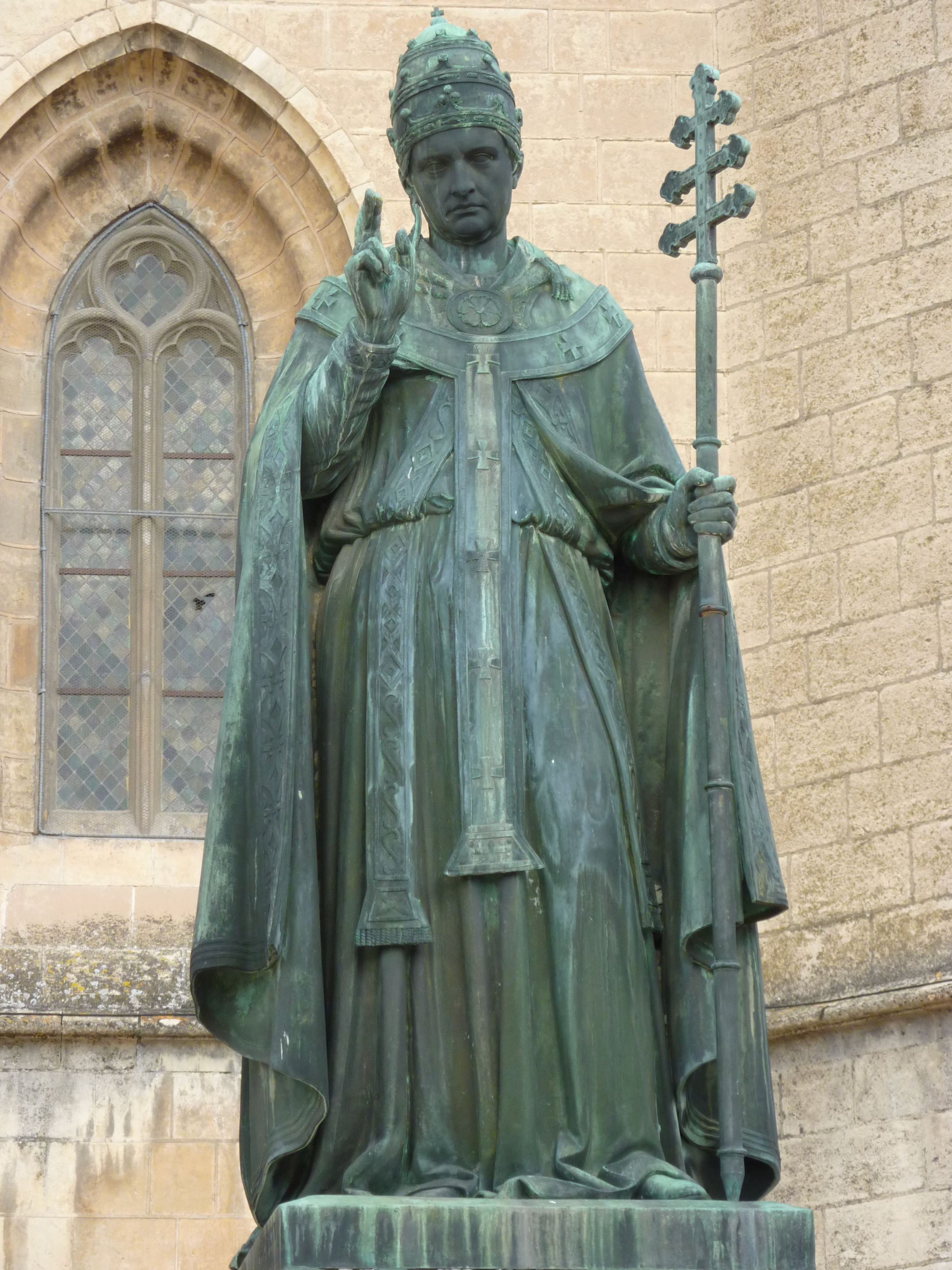 Statue d'Urbain V sur le parvis de la cathédrale de Mende.